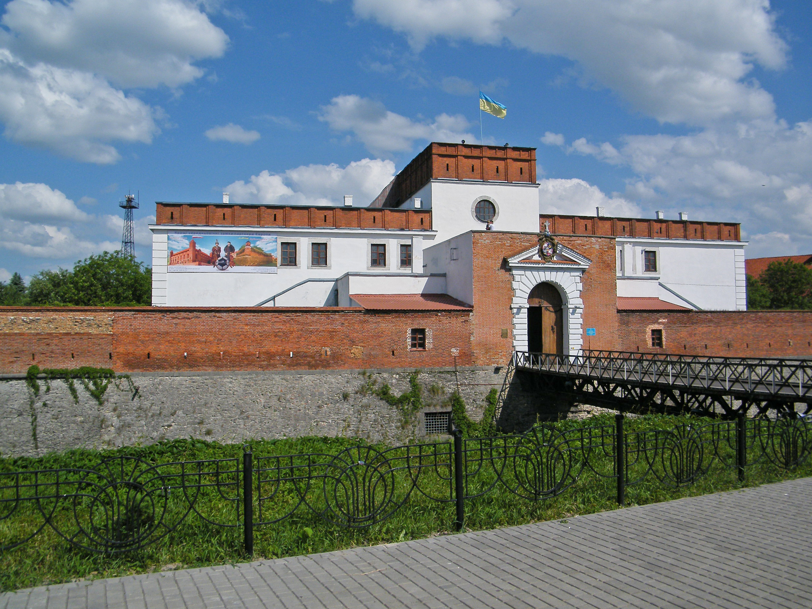 Вход в замок